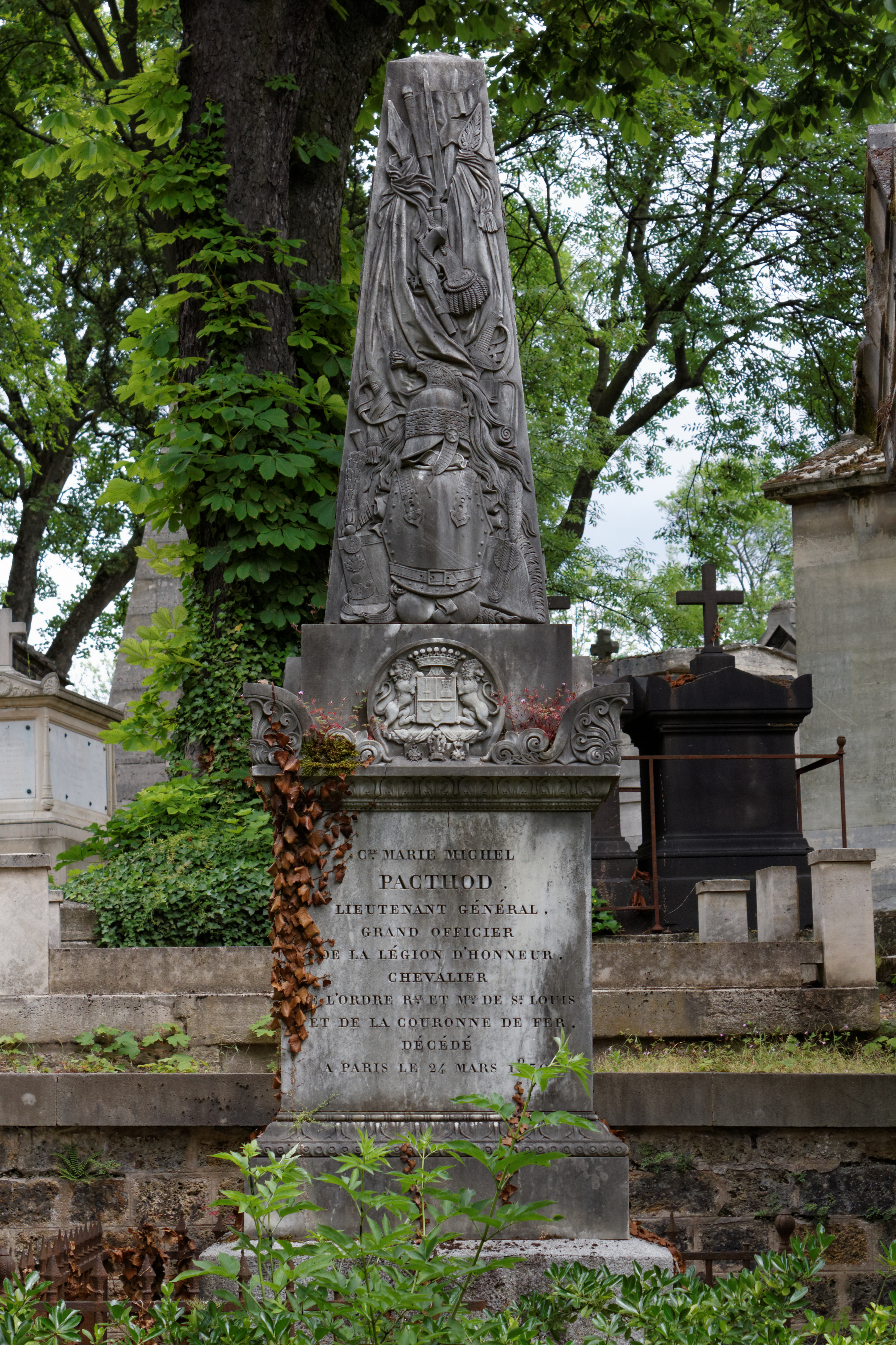 Tombeau surmonté d'un obélisque.